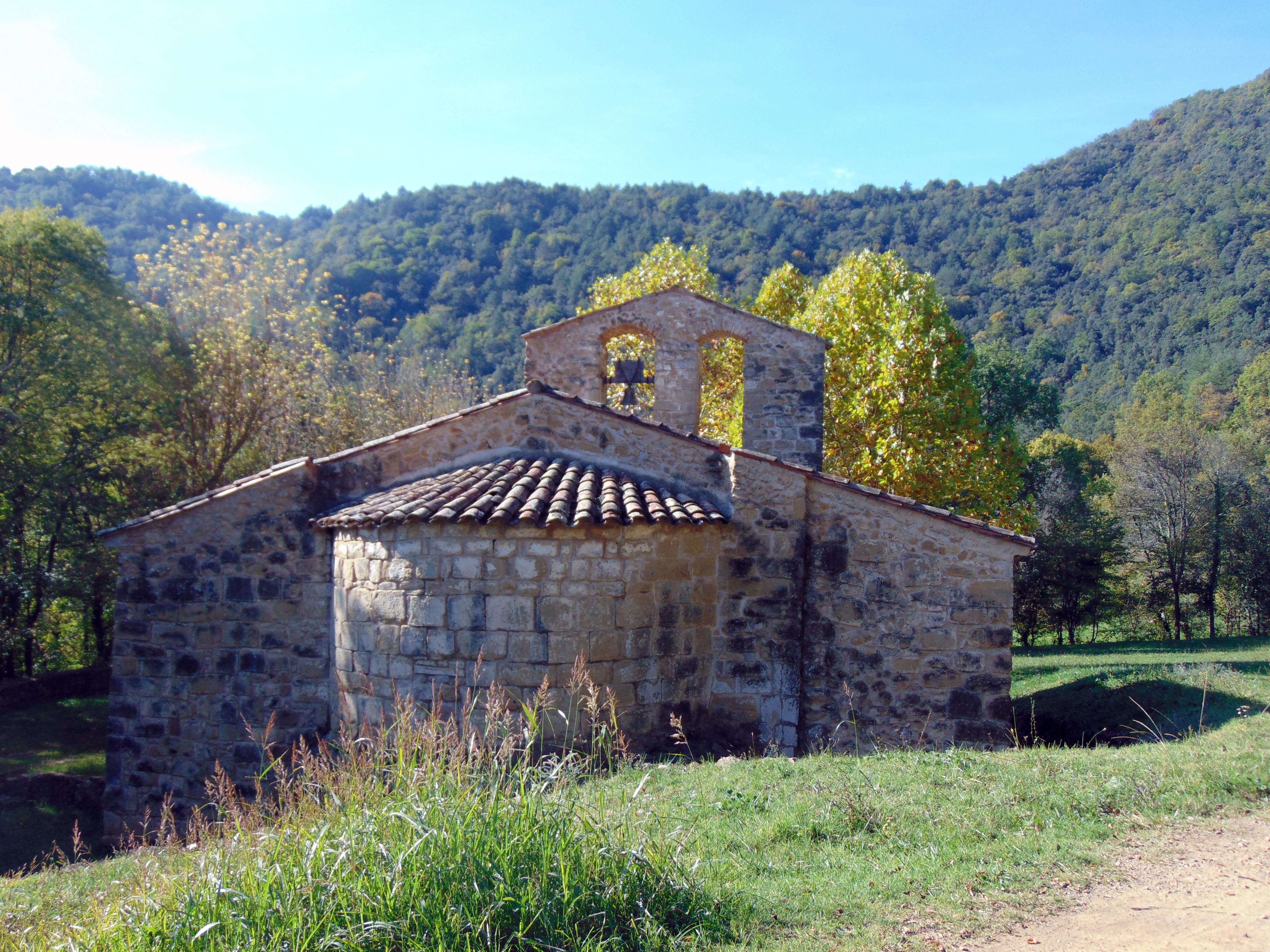 Capella de Sant Joan dels Balbs (la Vall d'en Bas)